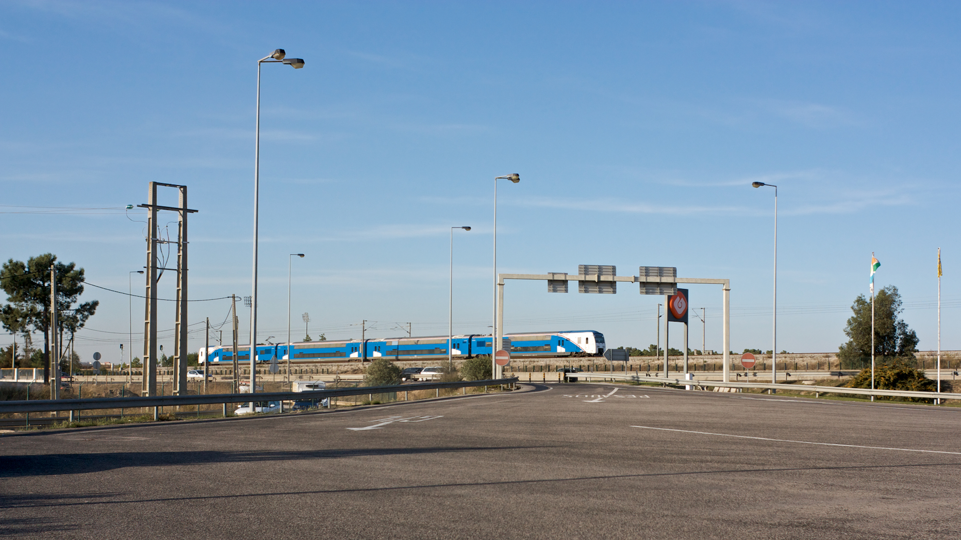 Tipo: Comboio Suburbano 14127 [Roma • Areeiro - Coina] Local: Amora [Linha do Sul, PK 14] Data e hora: 18 de Outubro de 2010 [17h17] Material: Automotora 35xx [Unidade Quádrupla Eléctrica]